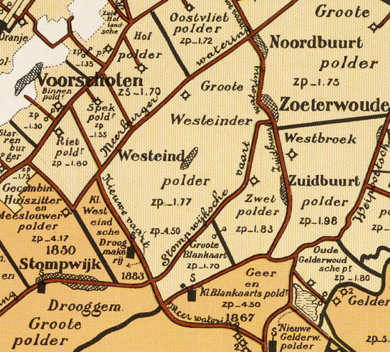 Groote_Westeindsche_Polder